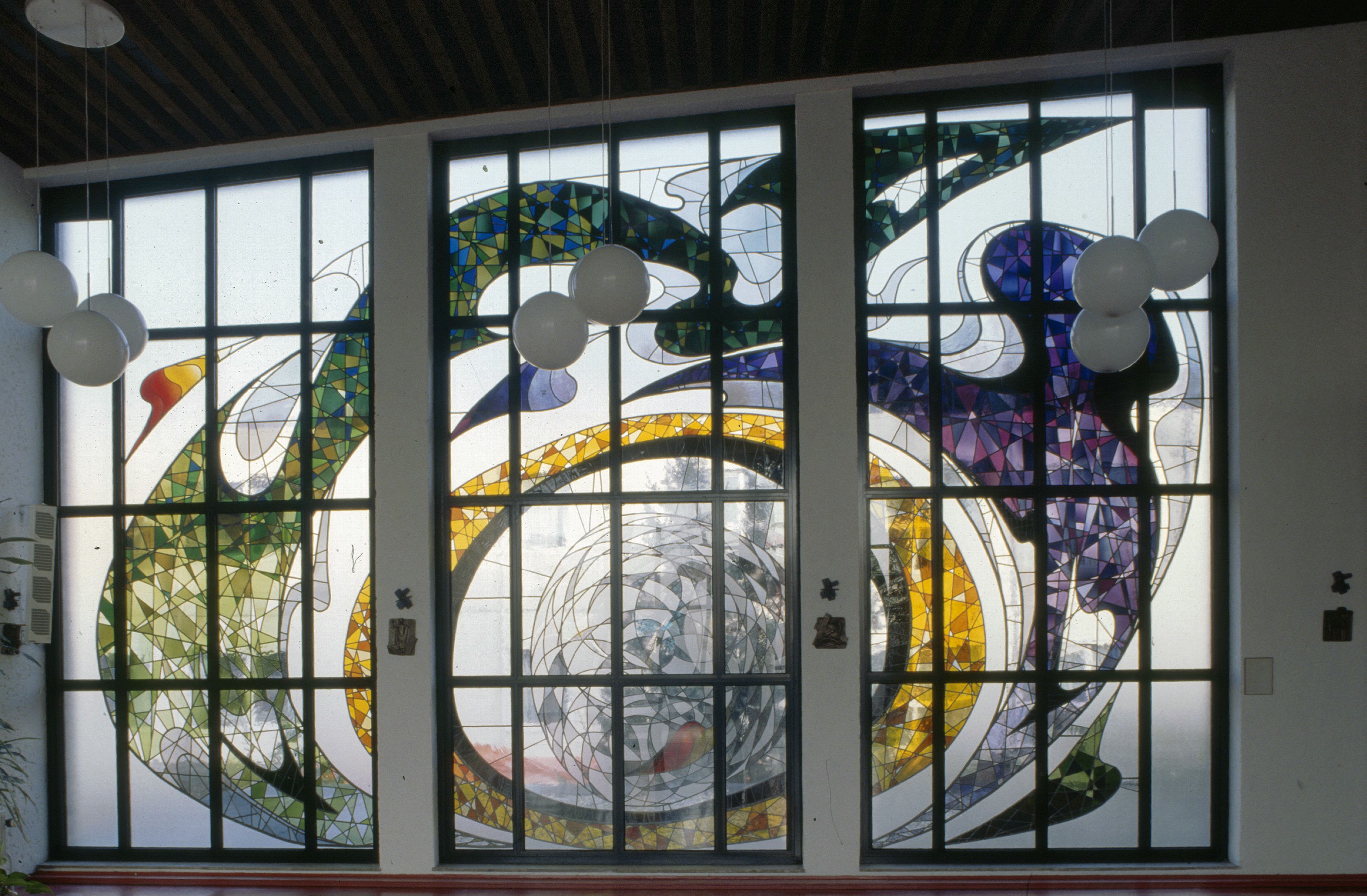 Verpleeghuis Joachim en Anna: Interieur kapel, rechterwand, gebrandschilderd glas: "Psalm 22", van beeldend kunstenaarTed Felen, 1982 (opmerking: Dia door kunstenaar Ted Felen geschonken aan de Rijksdienst voor de Monumentenzorg)